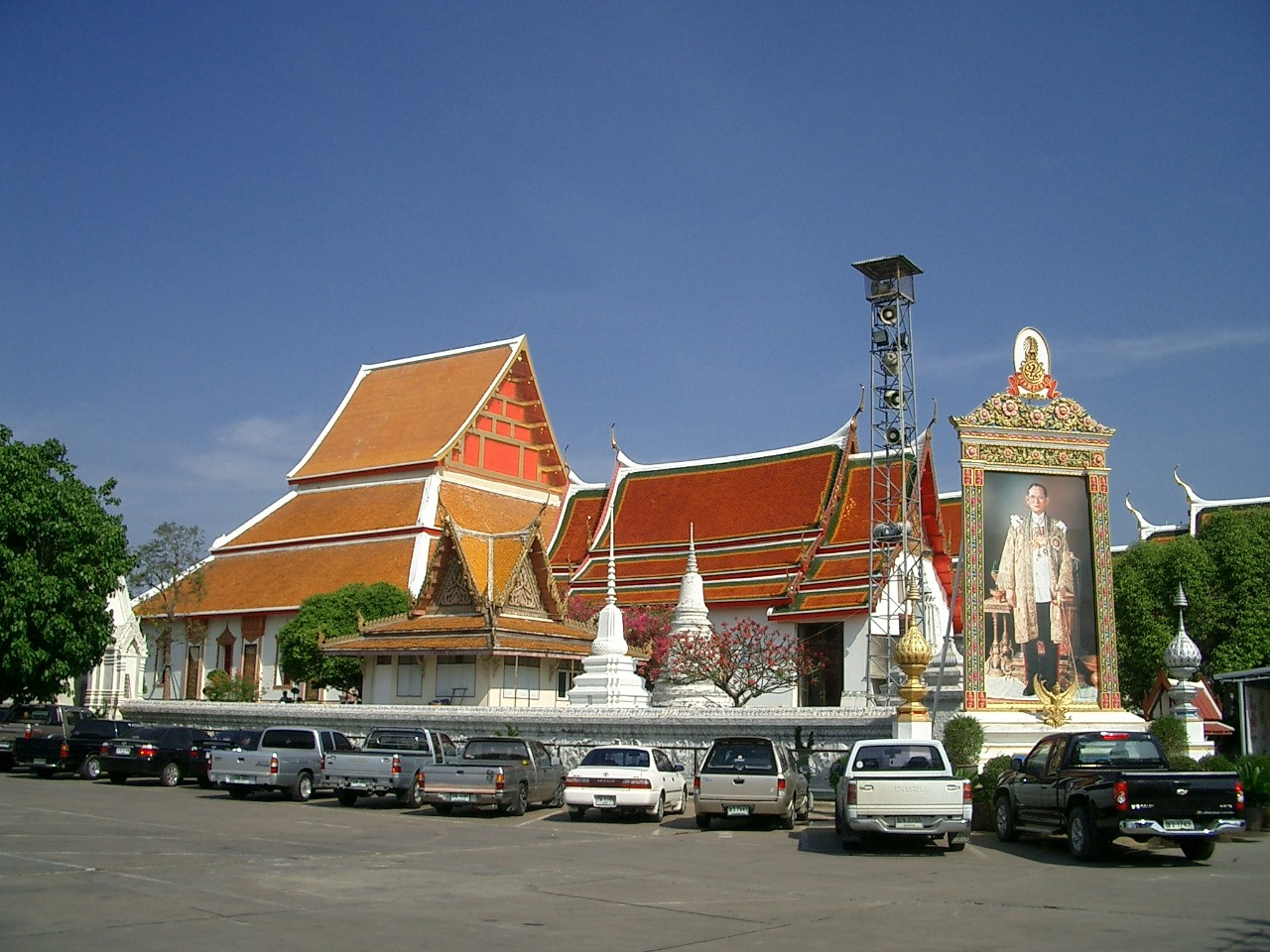 วัดพนัญเชิง พระนครศรีอยุธยา - Wat Phanan Choeng, Ayutthaya, Thailand ถ่ายโดยวลัยภรณ์ นาคพันธุ์ เมื่อ 25 มีนาคม 2549